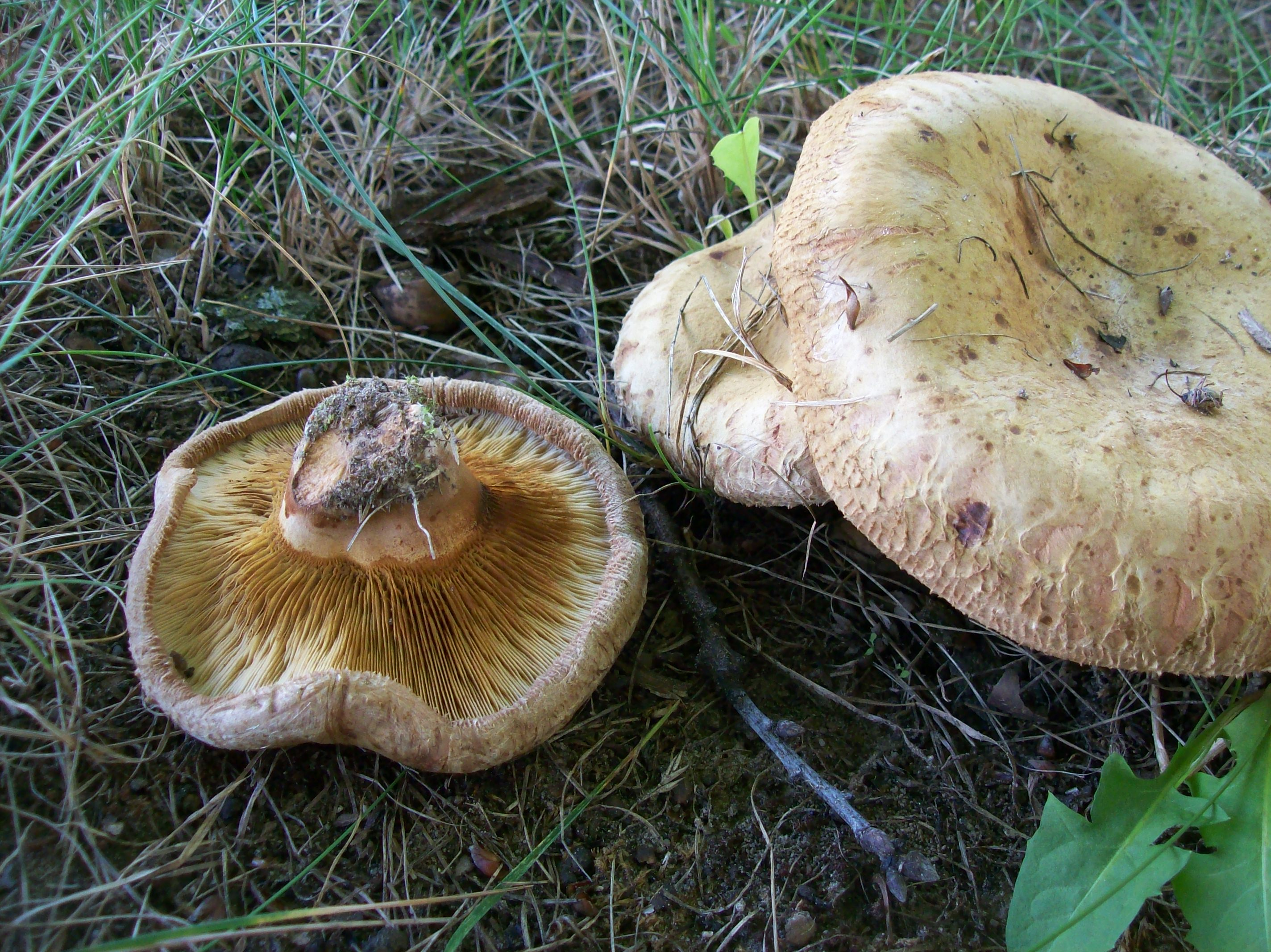 Der Große Krempling auf einer Wiese unter Linden